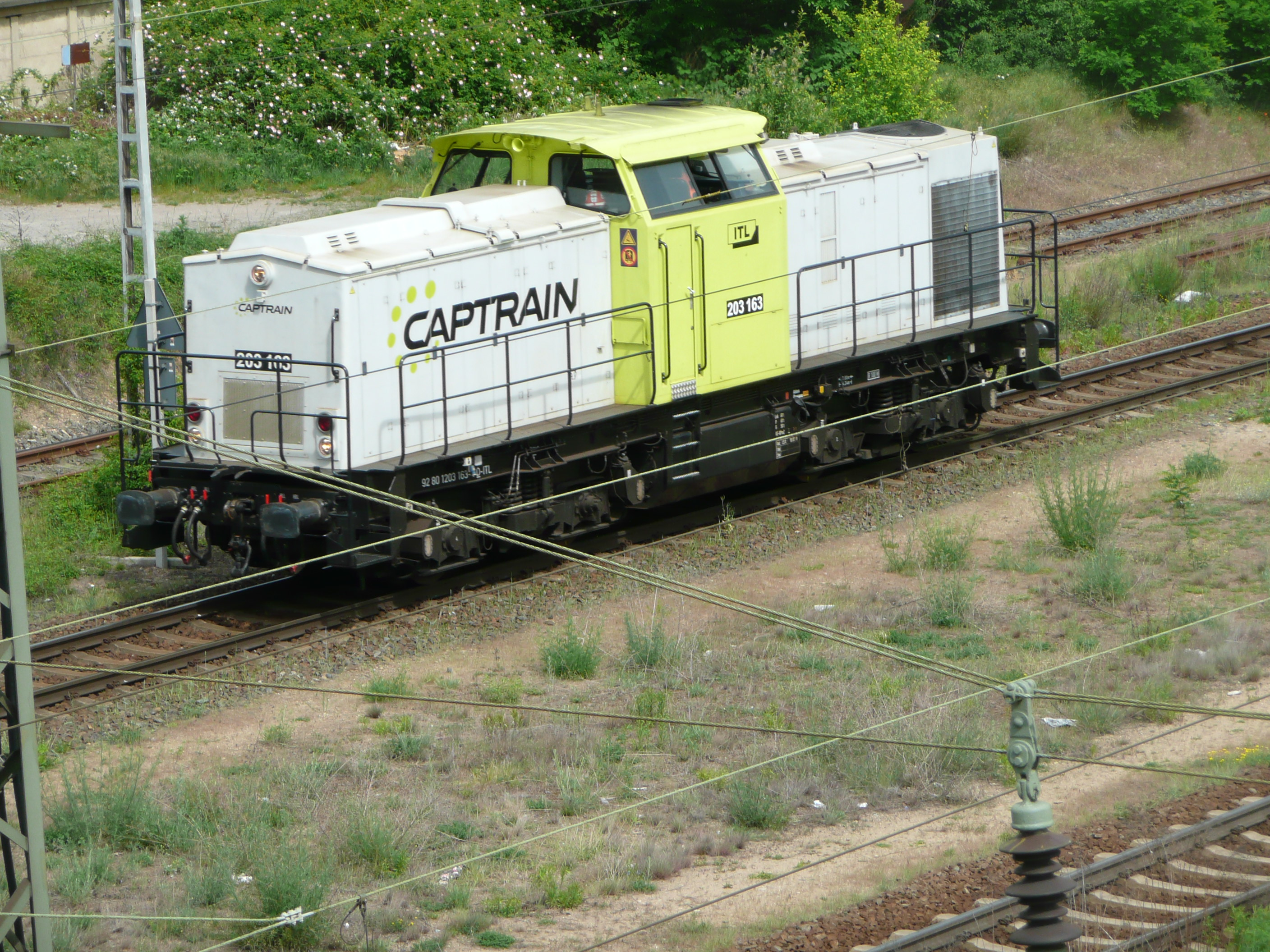 203 163 von Captrain beim Rangieren in Dresden-Friedrichstadt